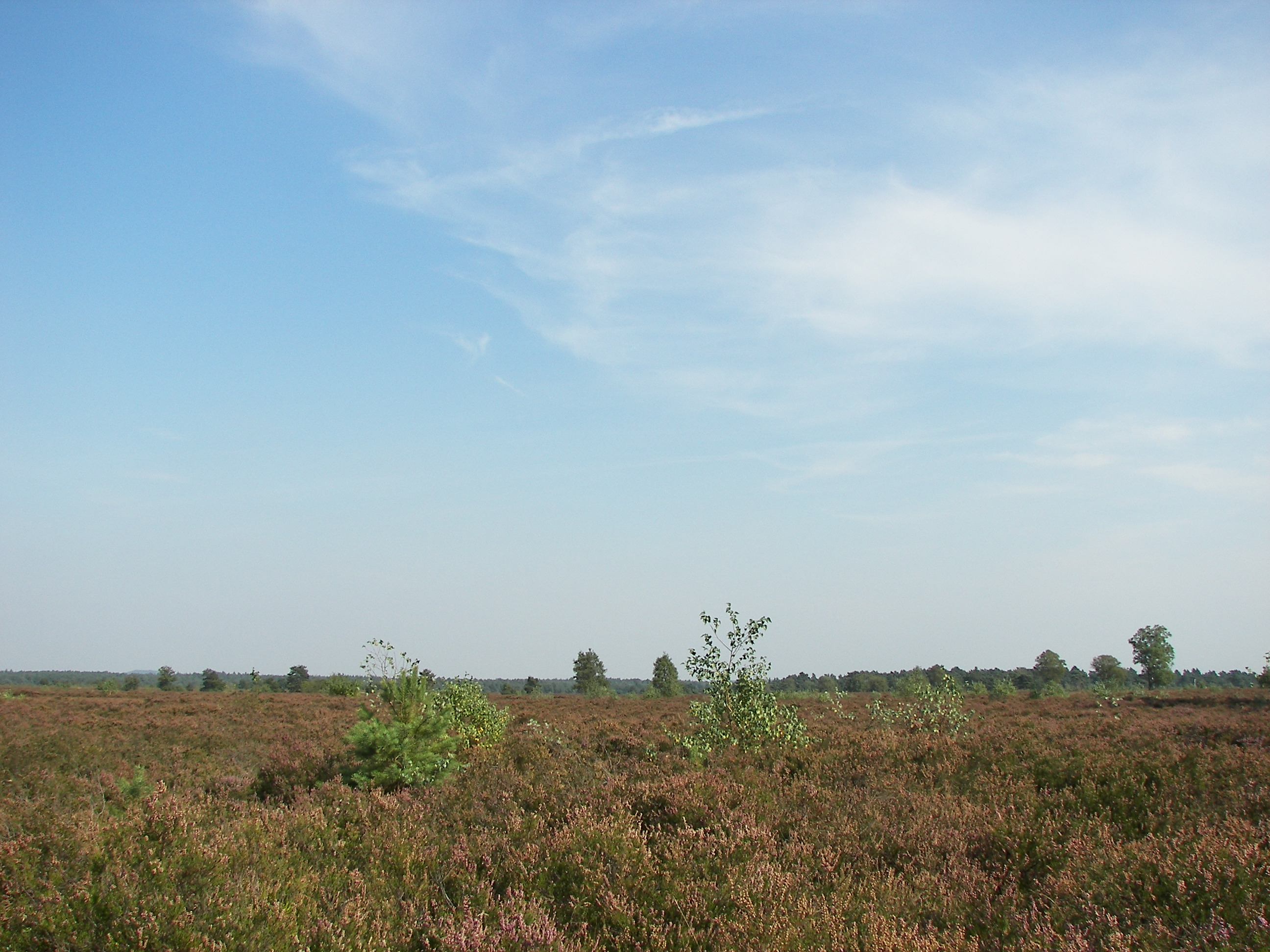 Osterheide bei Schneverdingen, Sandheide